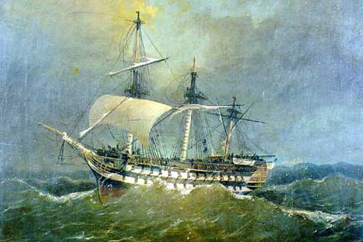 Óleo conservado en el Museo Naval de Madrid, (España). El navío español Asia, de 74 cañones, al mando de Roque Guruceta, sufrió un temporal mientras navegaba desde San Carlos, isla de Chiloé, a El Callao (Perú) en agosto de 1824.